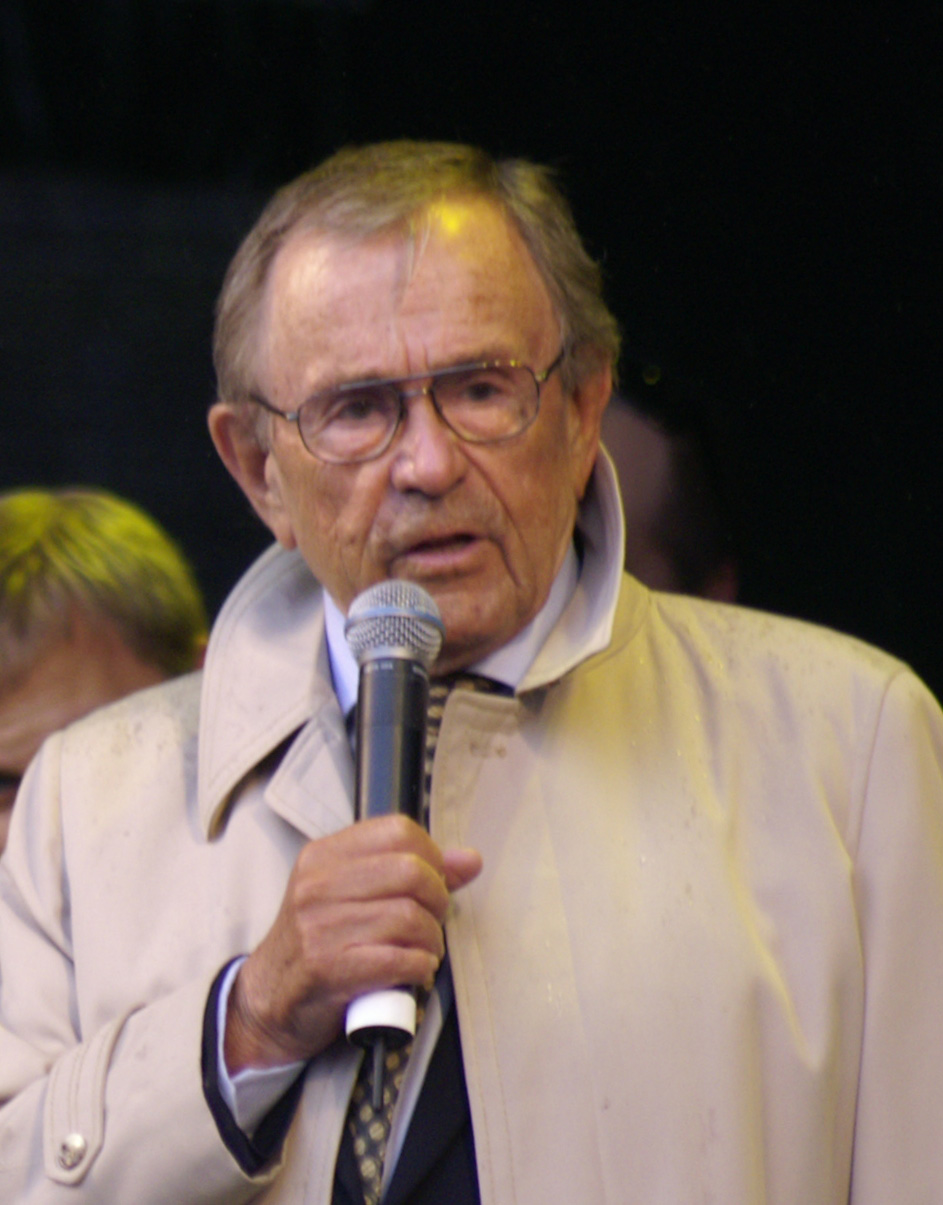 Arne Weise vid invigningen av Lundakarnevalen 2006